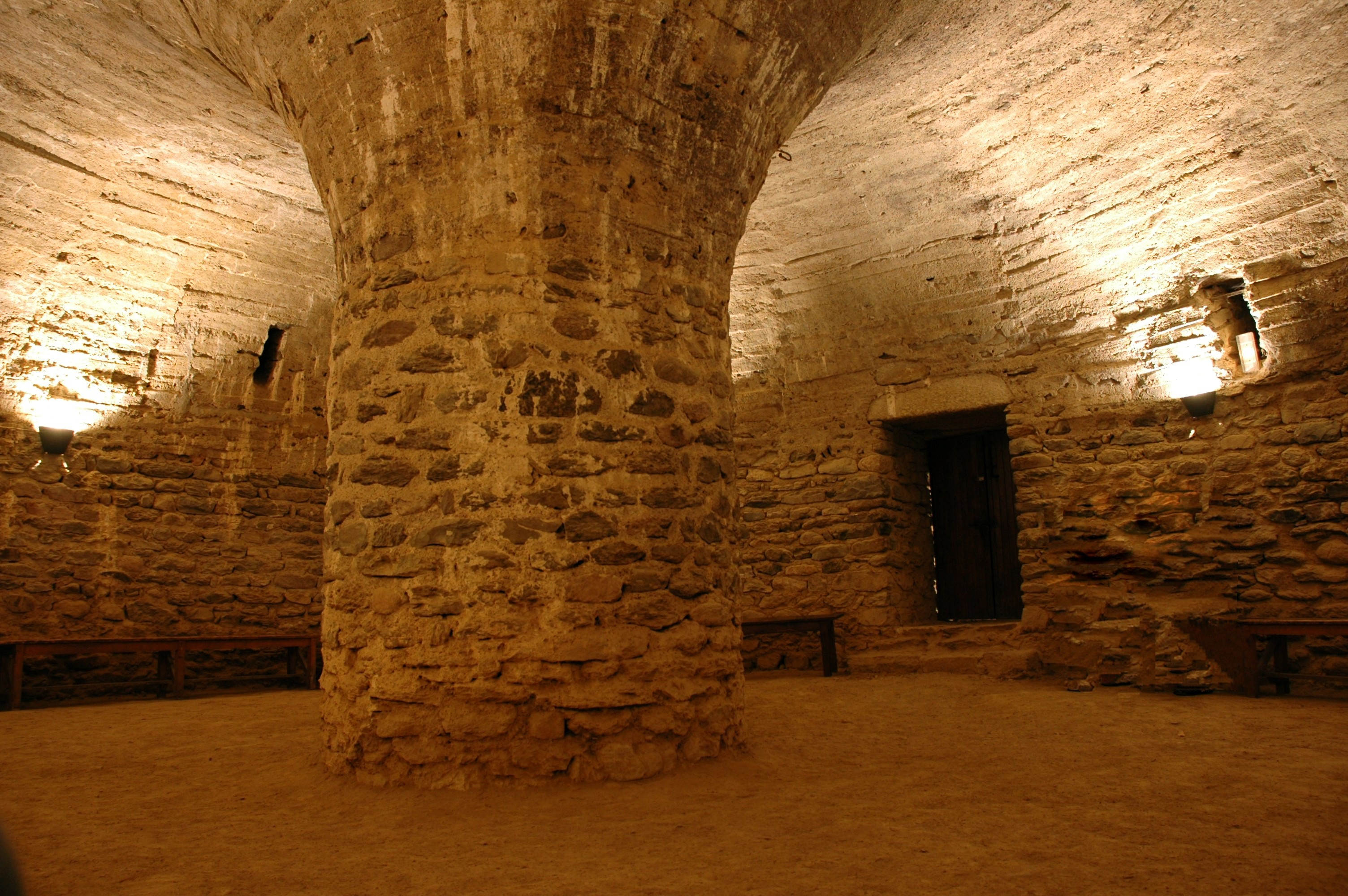 Sant Miquel de Cuixà - Cripta